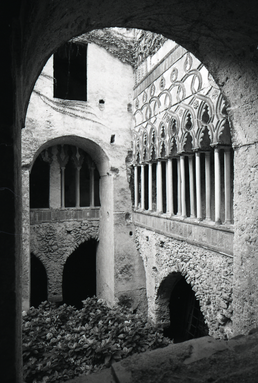 Servizio fotografico : Ravello, 1965 / Paolo Monti. - Strisce: 3, Fotogrammi complessivi: 15 : Negativo b/n, gelatina bromuro d'argento/ pellicola ; 35 mm. - ((I fotogrammi hanno una doppia numerazione. - Sul portanegativi: Leica ISS 21mm. - Occasione: Pubblicazione: "Emilio CECCHI, Natalino SAPEGNO (a cura di), Storia della Letteratura Italiana, 9 voll., Milano, Garzanti, 1966 e segg."